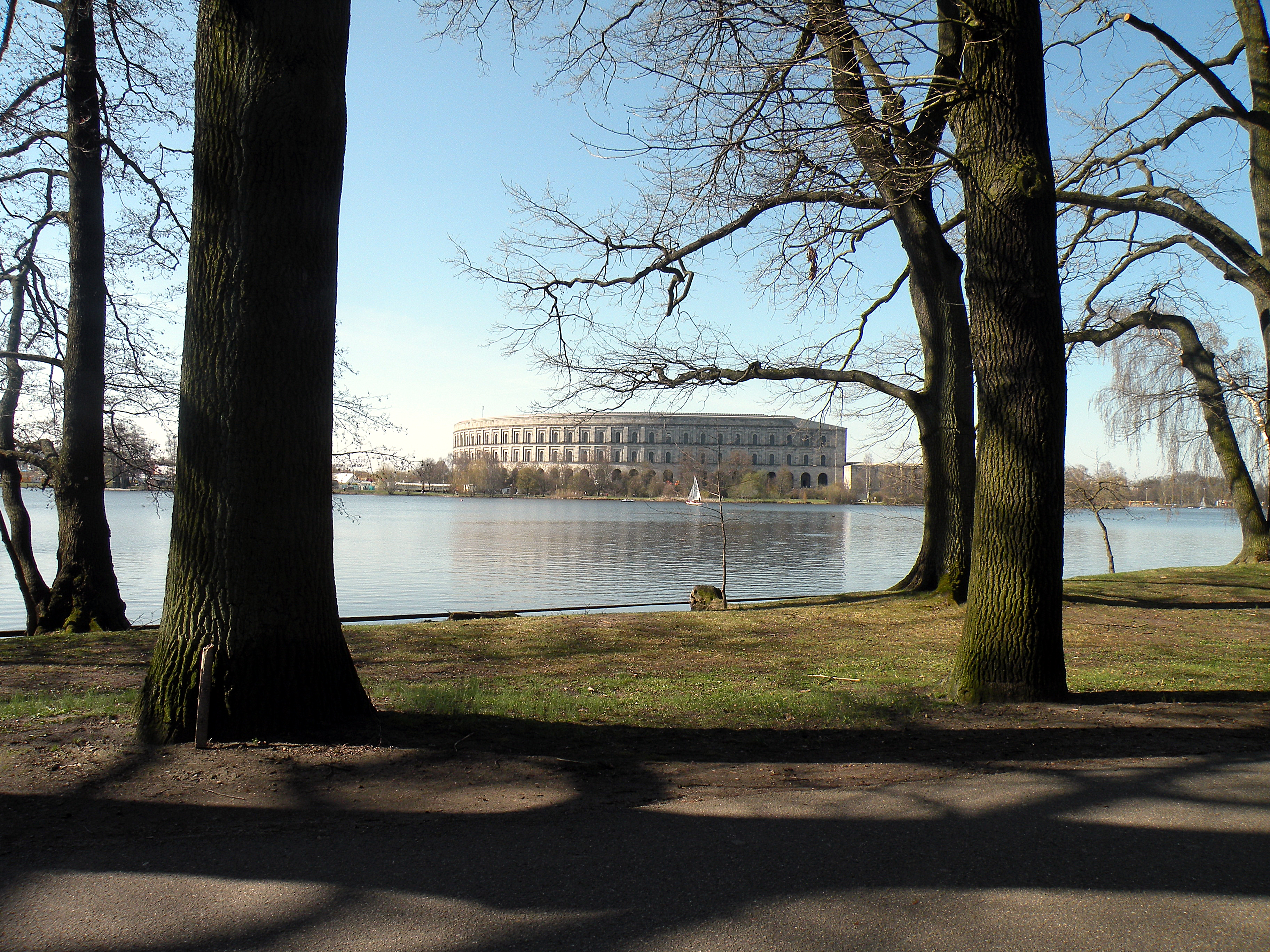 Дворец съездов НСДАП. Вид на N